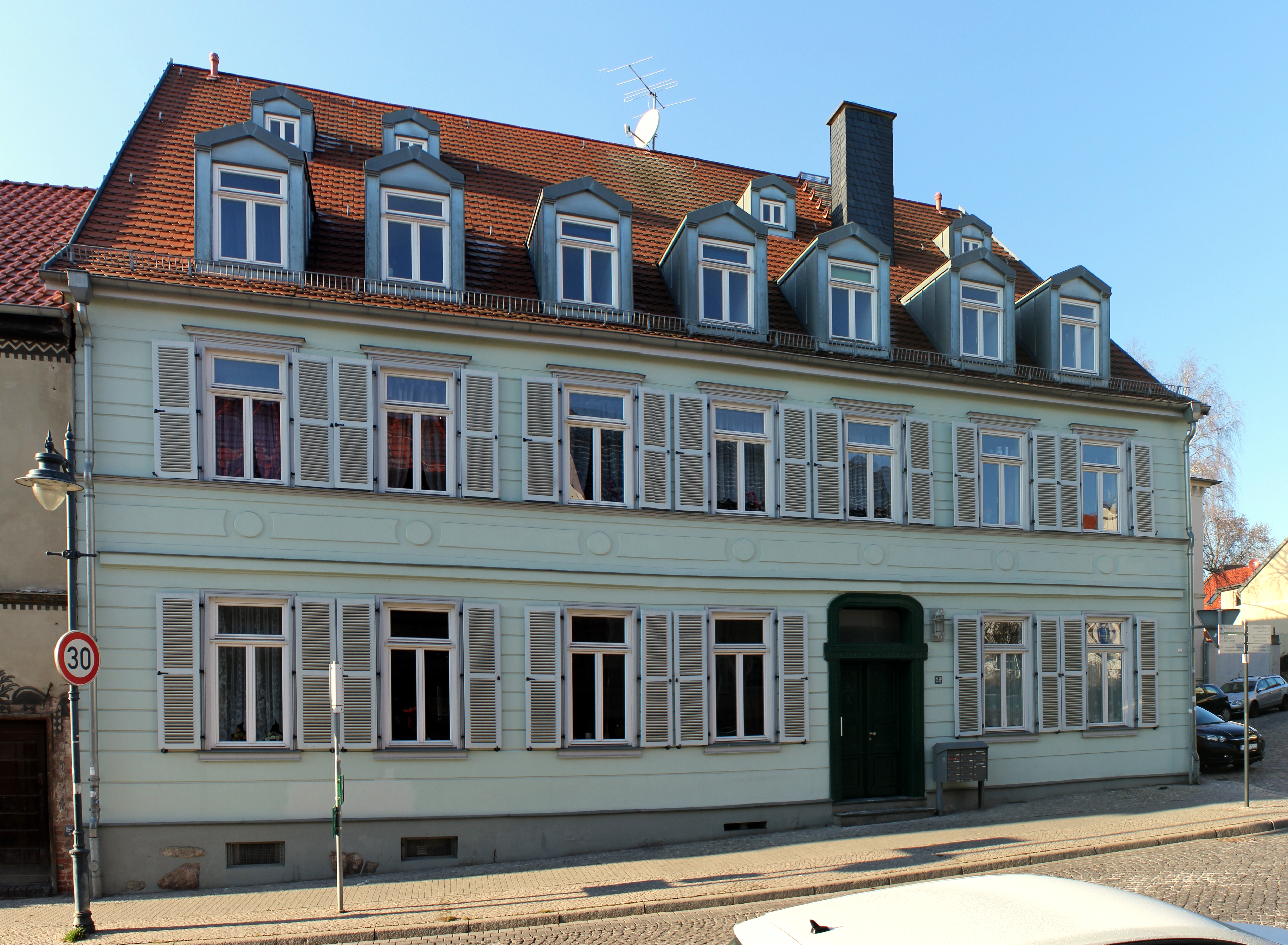 Wohnhaus Breiter Weg 38 Burg (bei Magdeburg)